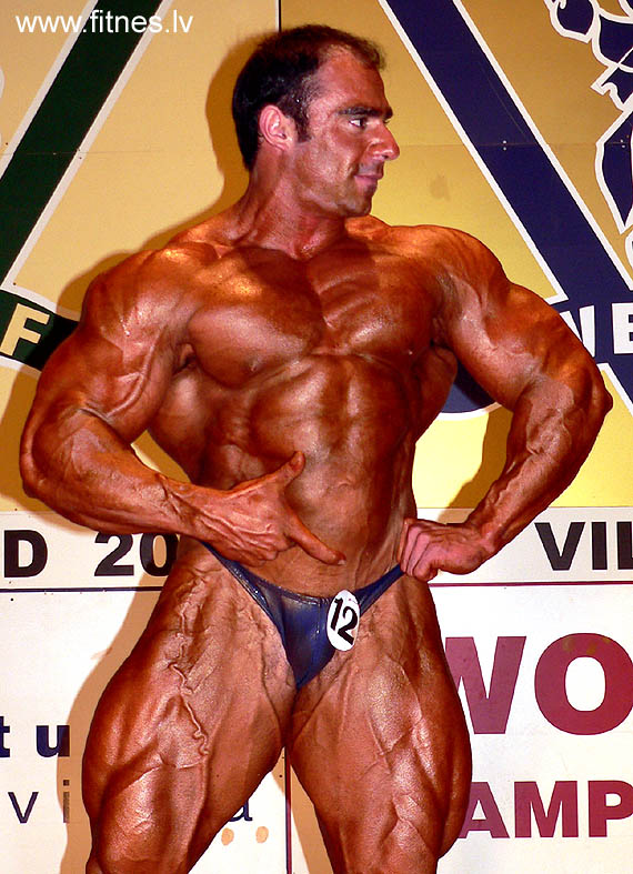 Foto tomada en londres championship